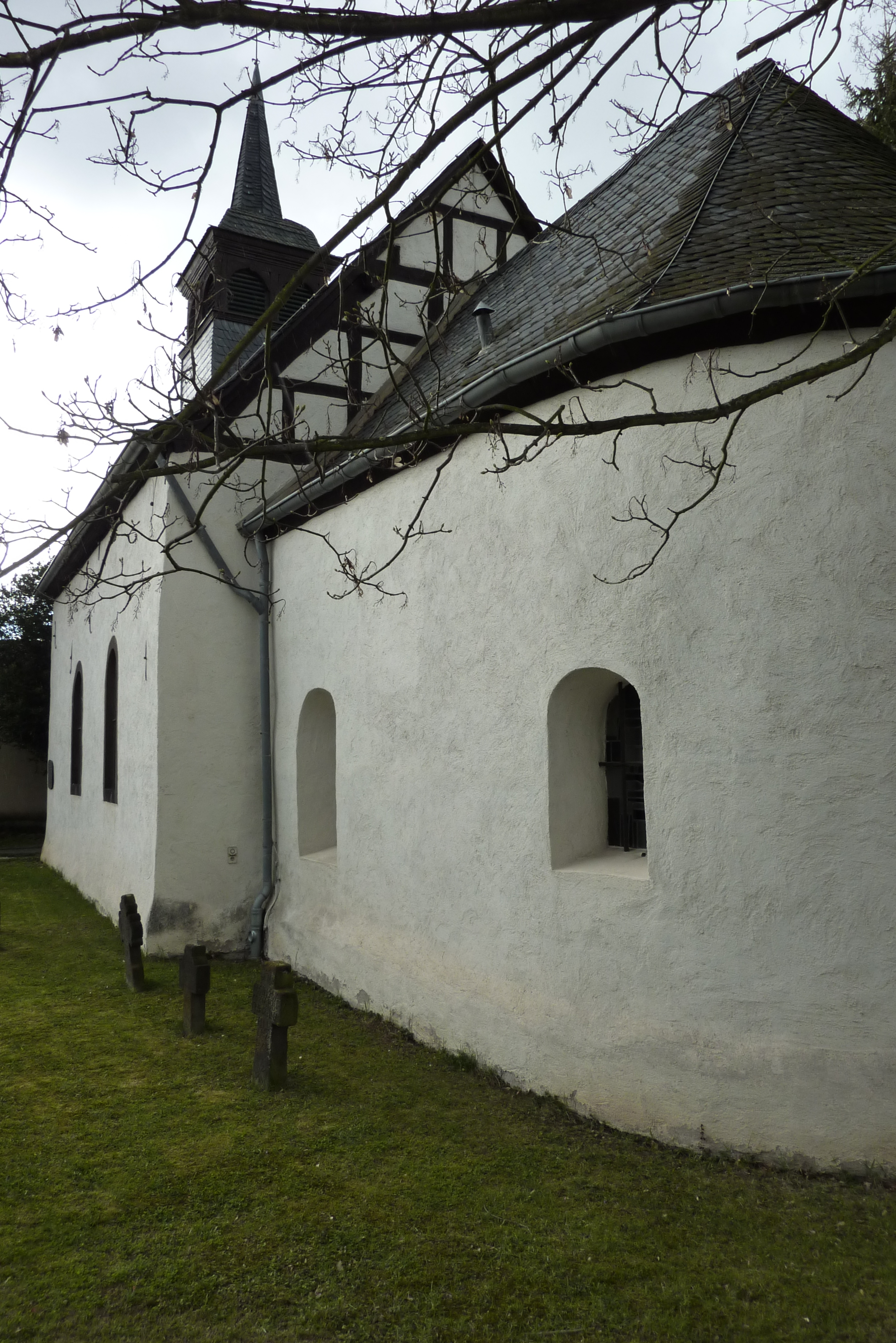 Ehlingen, Kapelle St. Hubertus, von Osten